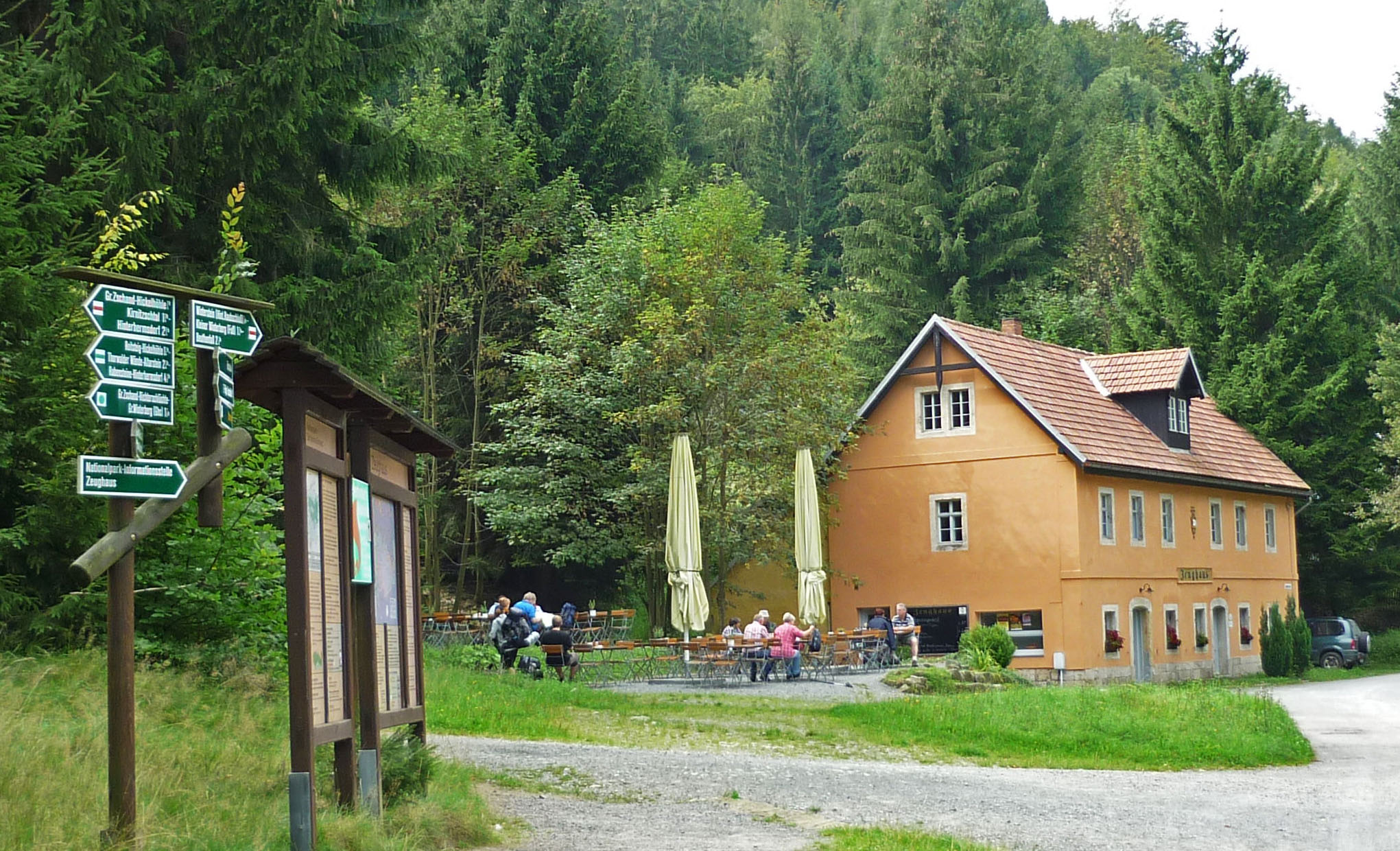 Zeughaus im Gr. Zschand